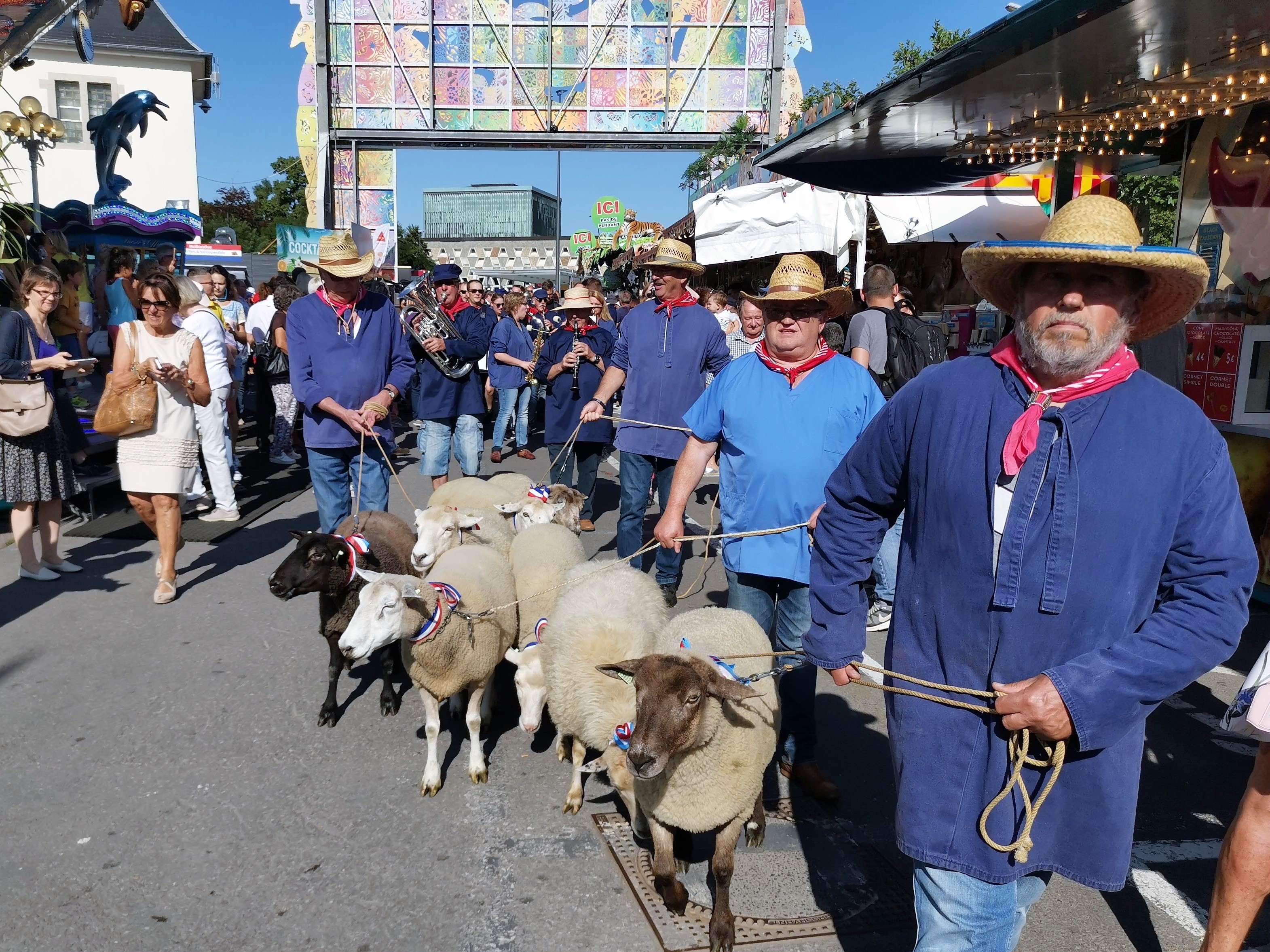 Luxembourg, ouverture de la Schueberfour 2019. Le "Hämmelsmarsch" (marche des moutons).